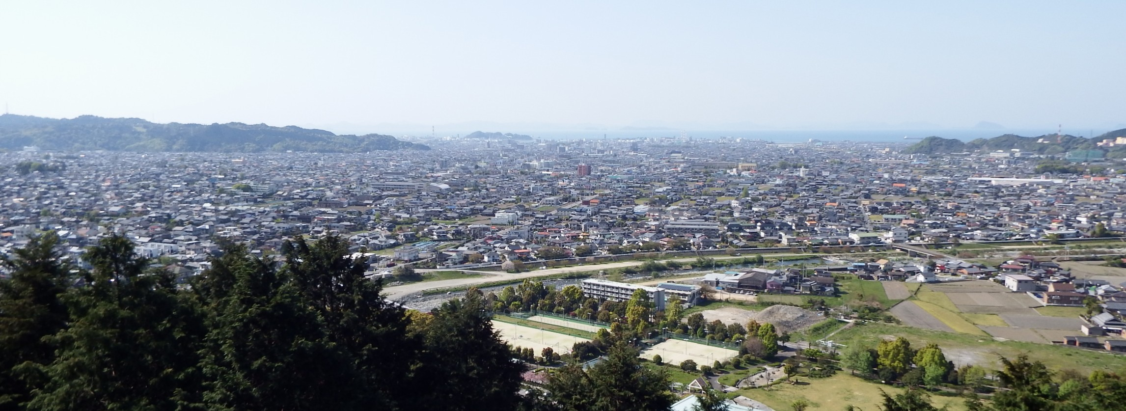 新居浜平野を大山積神社の奥宮から